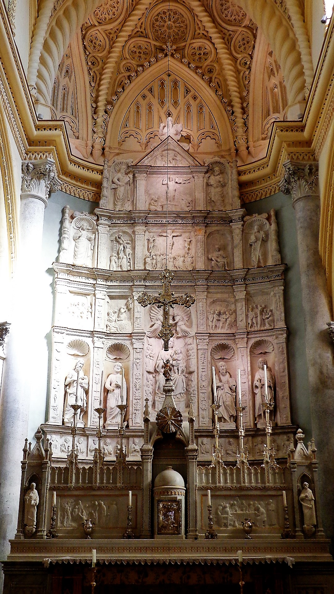 Ancona